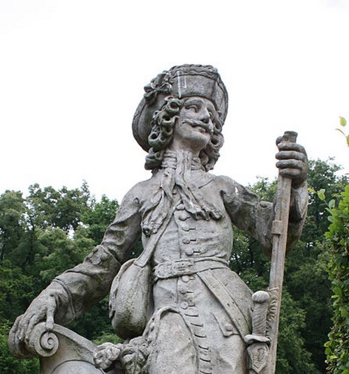 Садово-паркова скульптура «Марс»